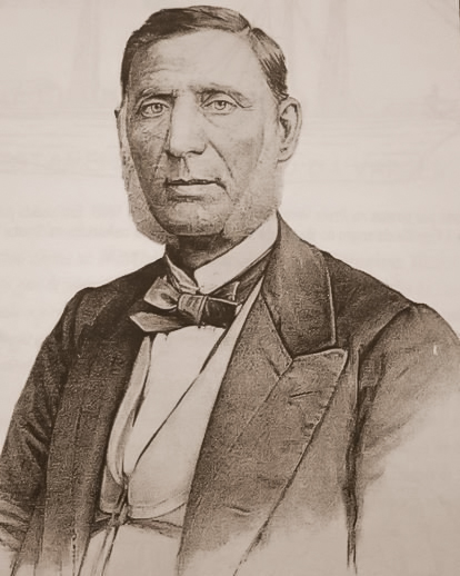 Matias Gonçalves de Oliveira Roxo, primeiro barão com grandeza de Vargem Alegre, (Pensalvos, 22 de setembro de 1804 — Vargem Alegre, 16 de setembro de 1879)